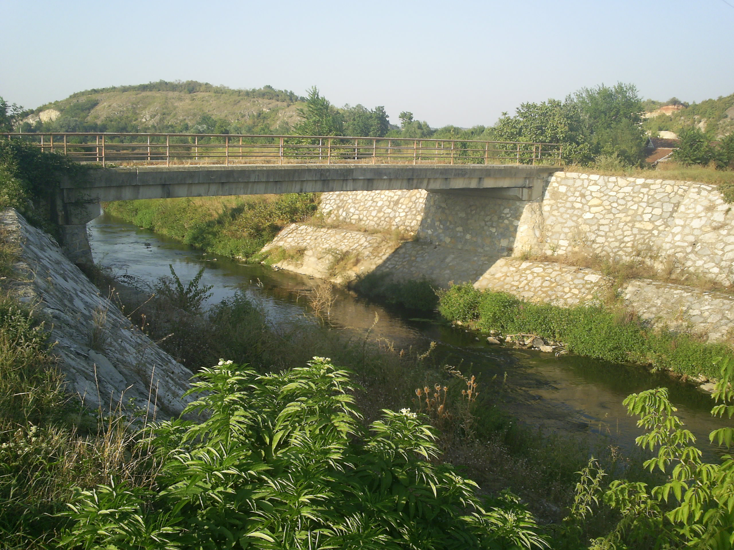 Река Лепеница у Градцу